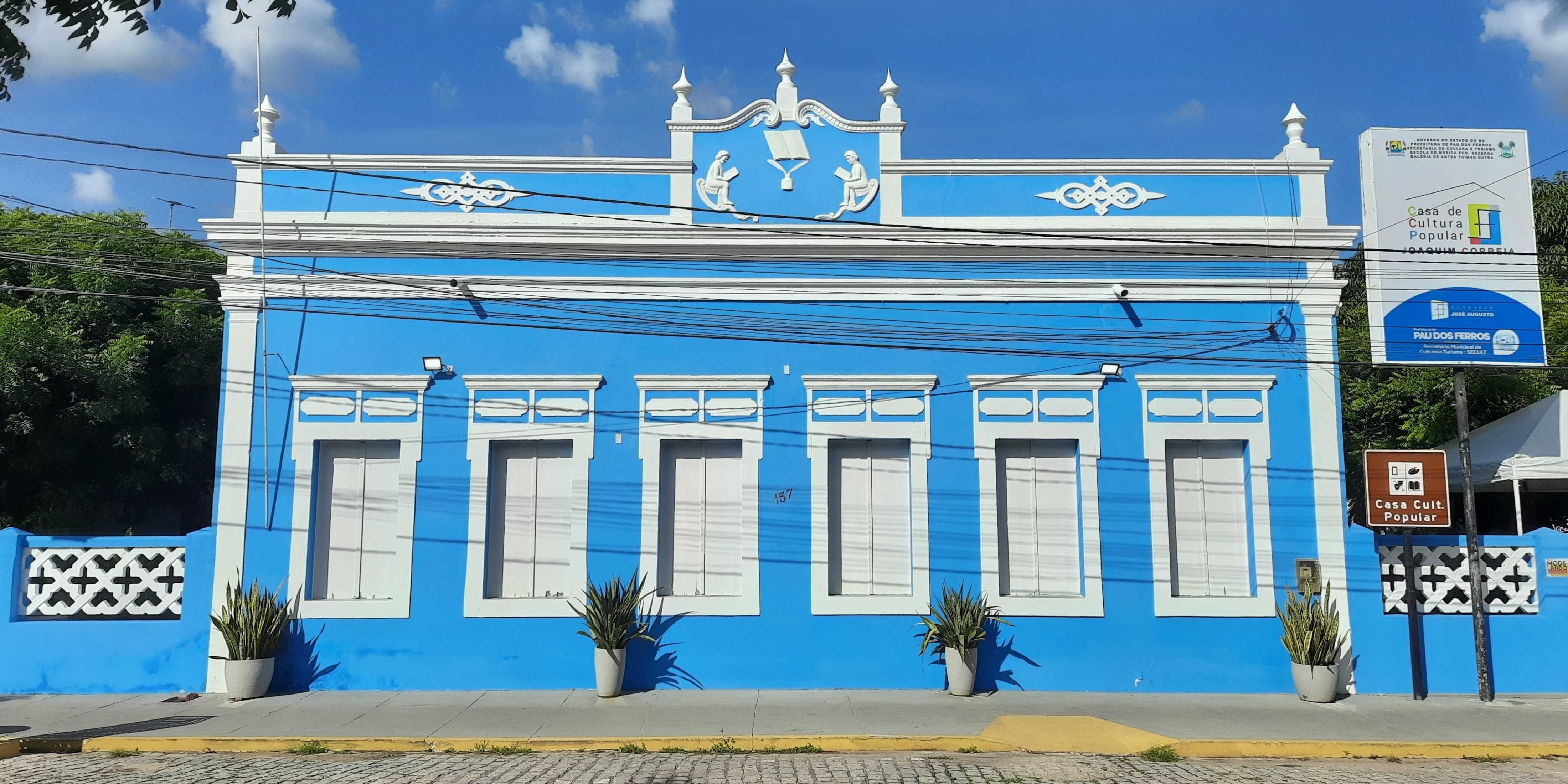 Casa de Cultura Popular Joaquim Correia, onde funciona a Secretaria Municipal de Cultura e Turismo, em Pau dos Ferros, Rio Grande do Norte, Brasil.